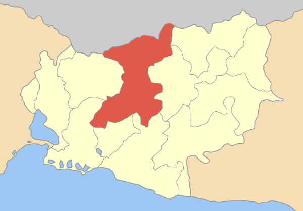 Locator map of Komotini municipality (Δήμος Κομοτηνής) in Rodopi prefecture (Νομός Ροδόπης) in Greece.